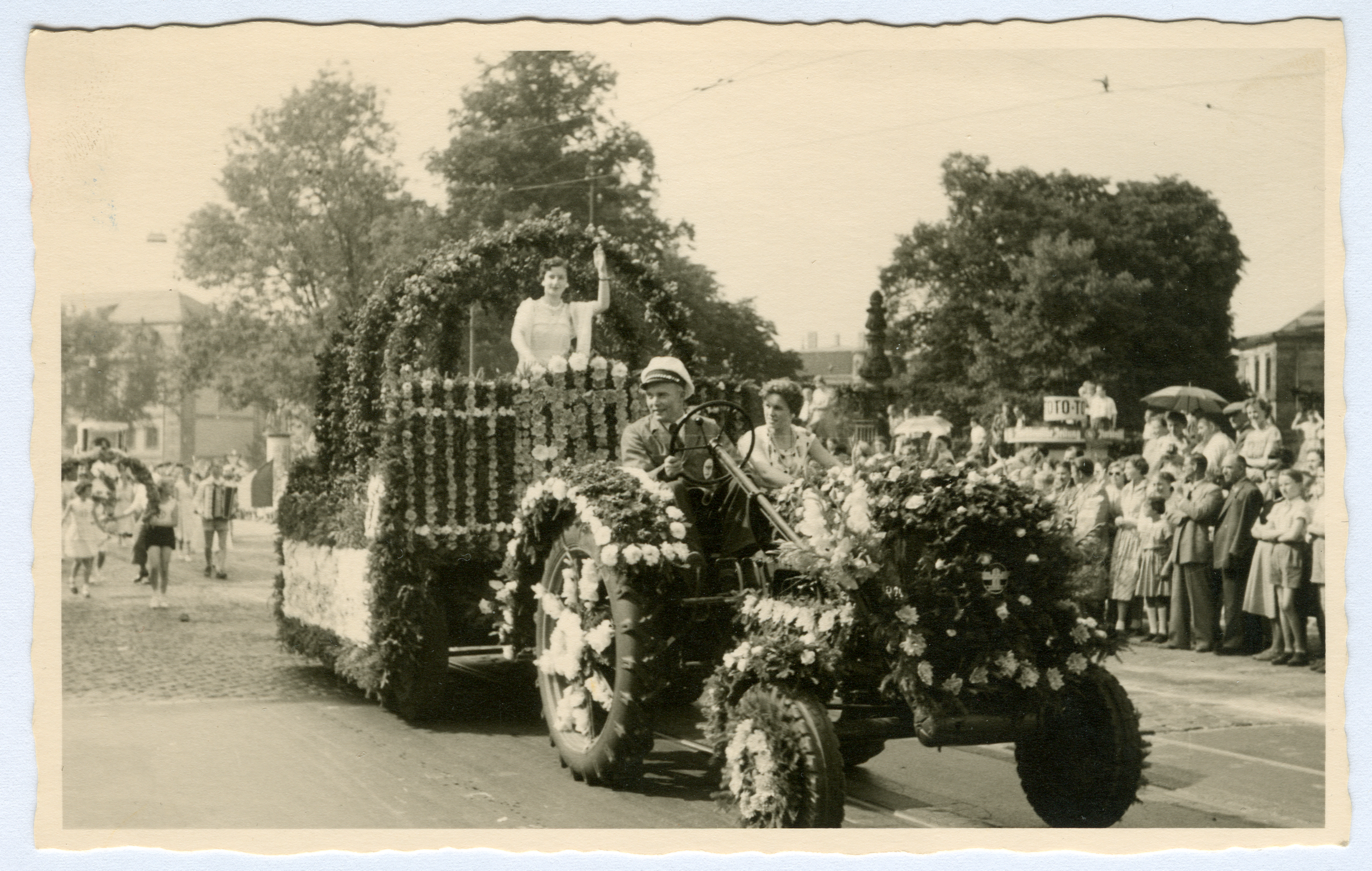 Der Blumenkorso in Hannover war 1951 der Höhepunkt der ersten Bundesgartenschau (28. April bis 31. Oktober 1951): Inmitten von Trümmern und dem arbeitsreichen Wiederaufbau beteiligten sich weit mehr als 100 Gruppen, Vereine, Verbände und Firmen aus der Stadt Hannover mit blumengeschmückten Wagen an der Fahrt von der Herrenhäuser Allee zum Ausstellungsgelände an der Stadthalle. Rund 400.000 Zuschauer schöpften mit dem farbenfrohen Spektakel wieder Hoffnung für die Zukunft. Das Schwarz-/Weiß-Foto wurde am (heutigen) Friedrichswall aufgenommen mit Blick in Richtung Leineschloß und Niedersächsisches Landesarchiv.